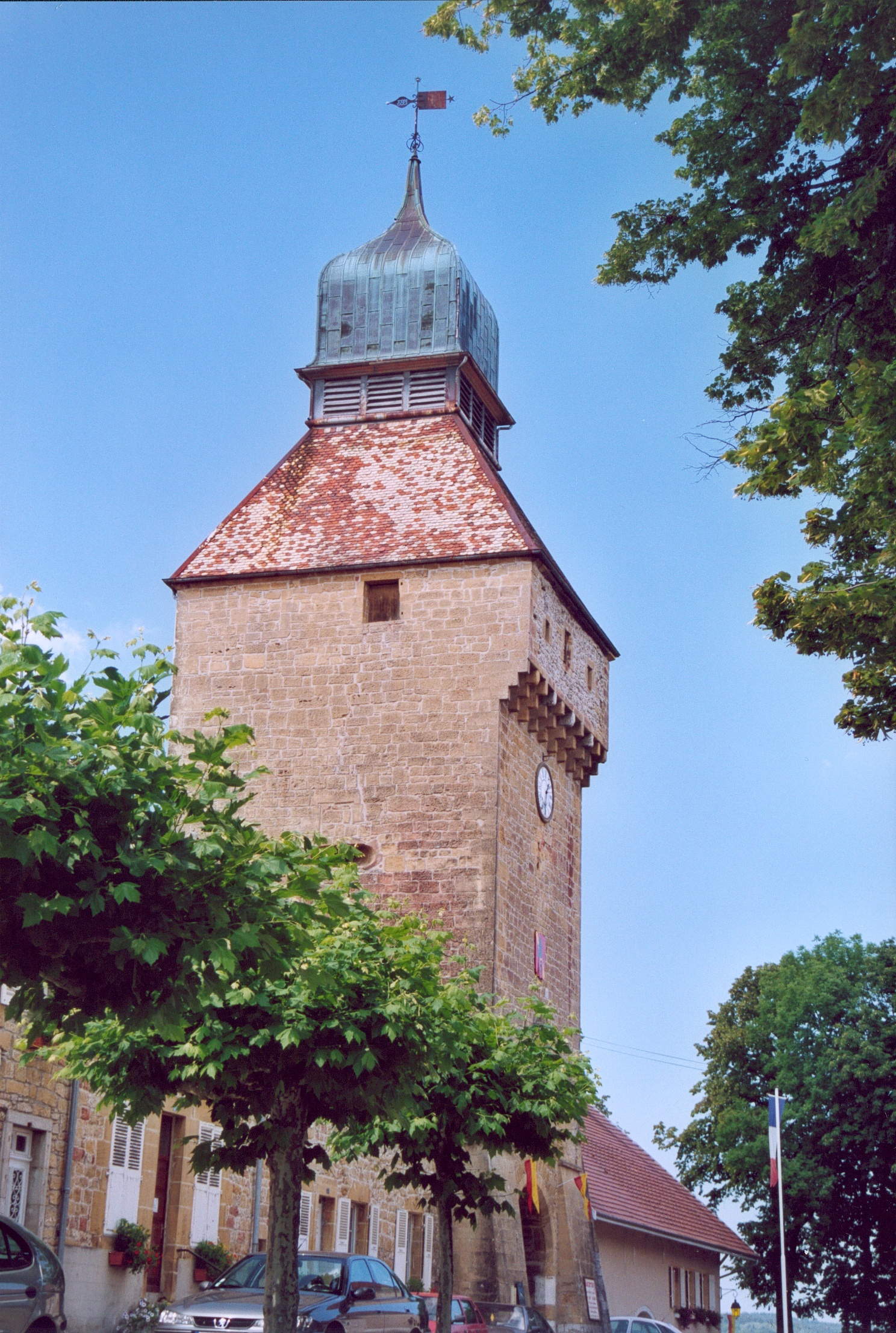 Nozeroy Doubs France Photographie prise par Patrick GIRAUD